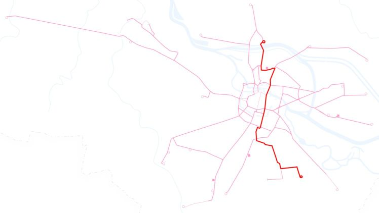 Poglądowa mapka przebiegu linii tramwajowej 8 we Wrocławiu.